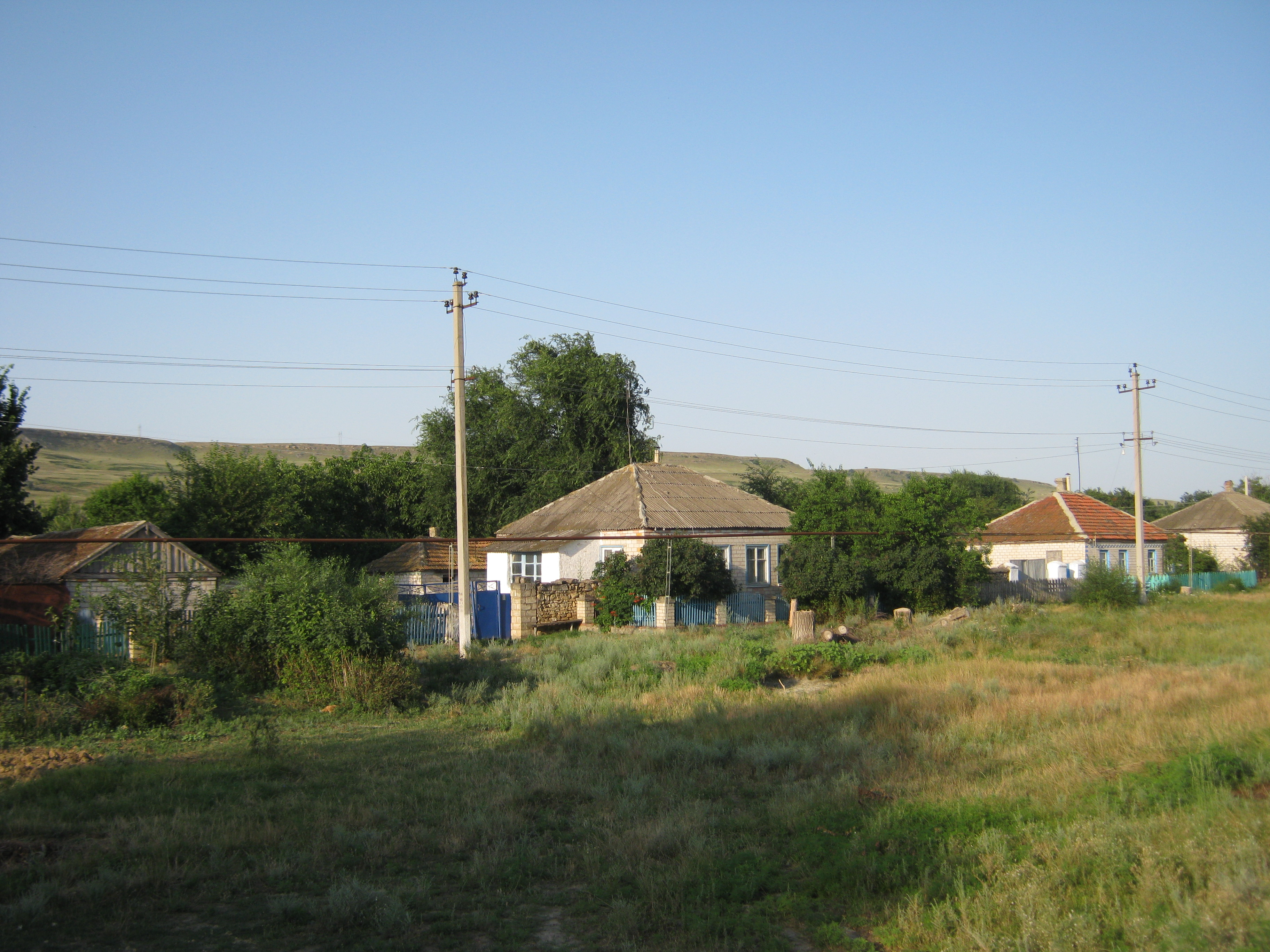 Просянка (улица)